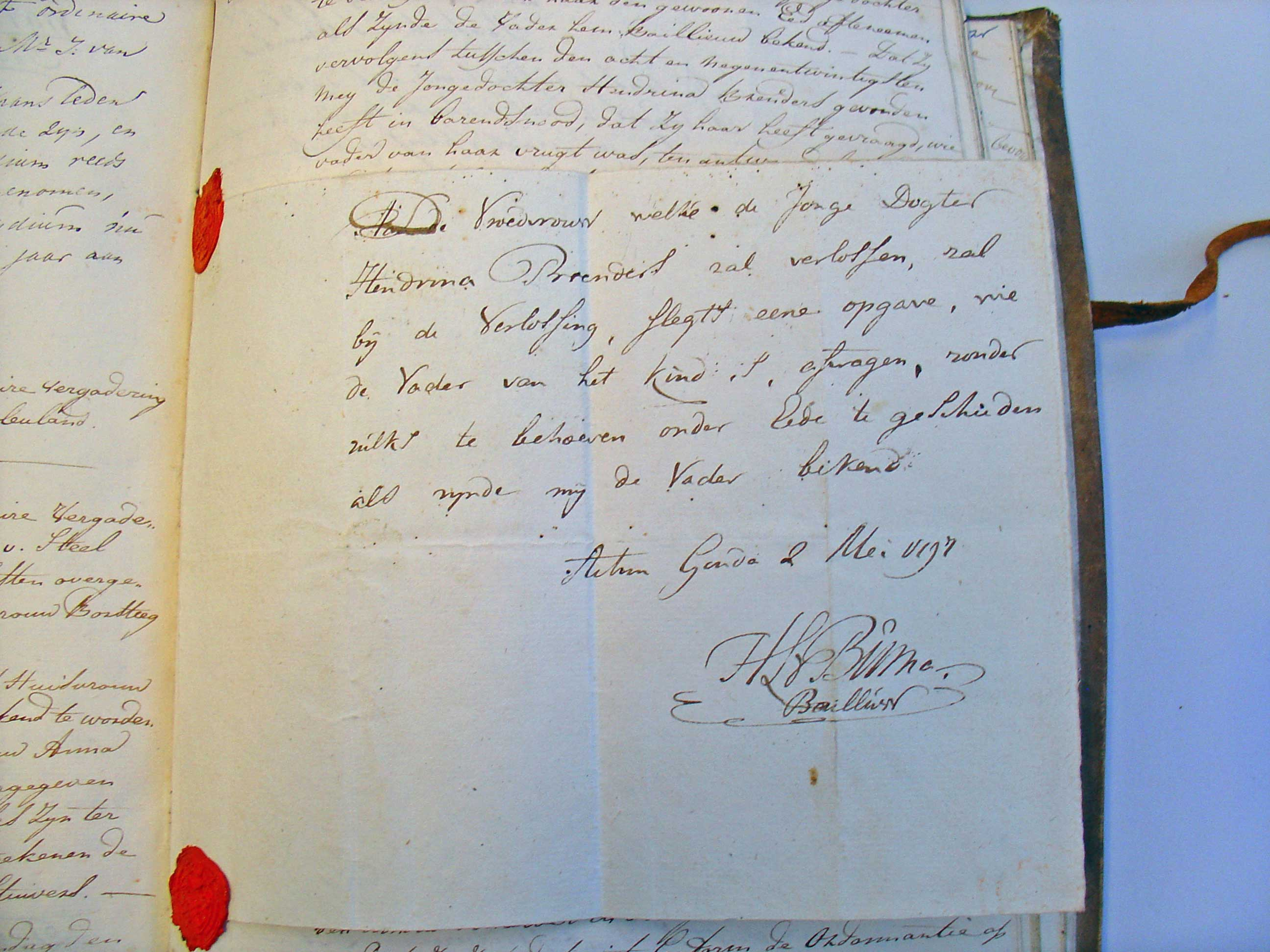 verklaring van de baljuw van Gouda, Hanzo Lemstra van Buma, dat de vroedvrouw (Antje Nagel) geen verklaring onder ede van de kraamvrouw omtrent het vaderschap behoefde af te nemen.